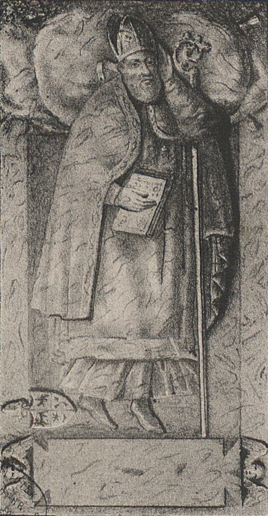 Беларуская (тарашкевіца): Надмагільле Паўла Гальшанскага (Pavał Halšanski) зь літаграфіі Ю. Азямблоўскага